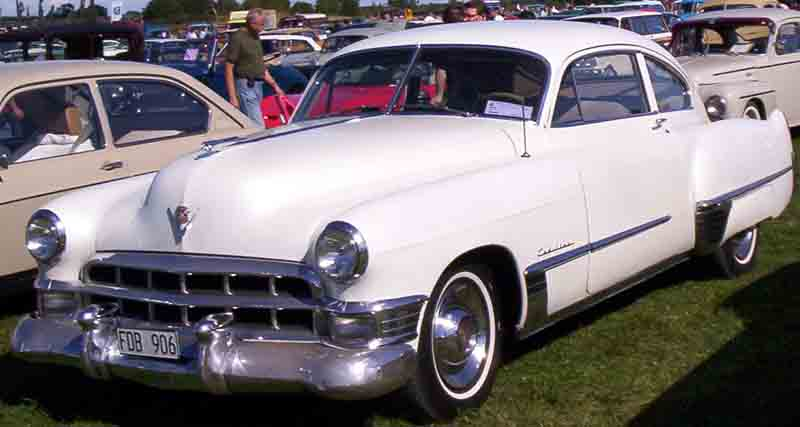 1949 Cadillac Series 49-6207 Club Coupe